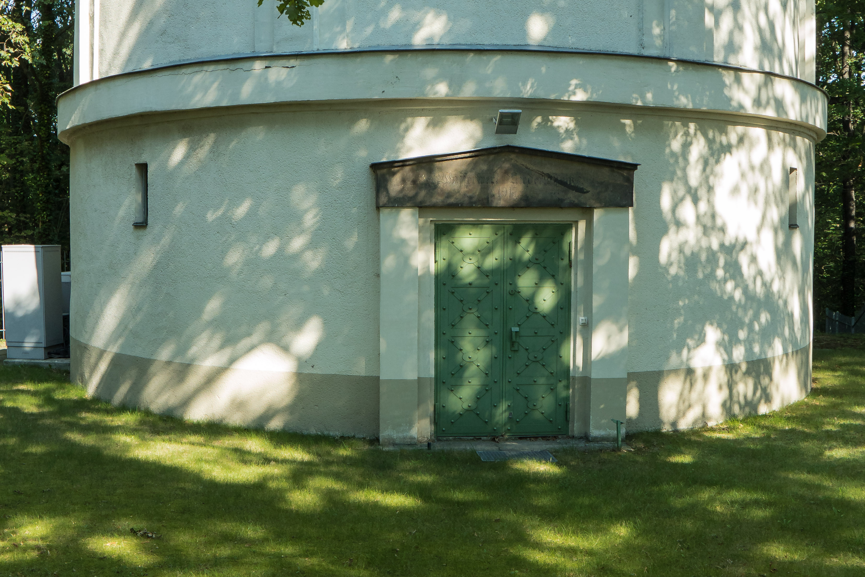 Wasserturm auf der König-Friedrich-August-Höhe in Radebeul